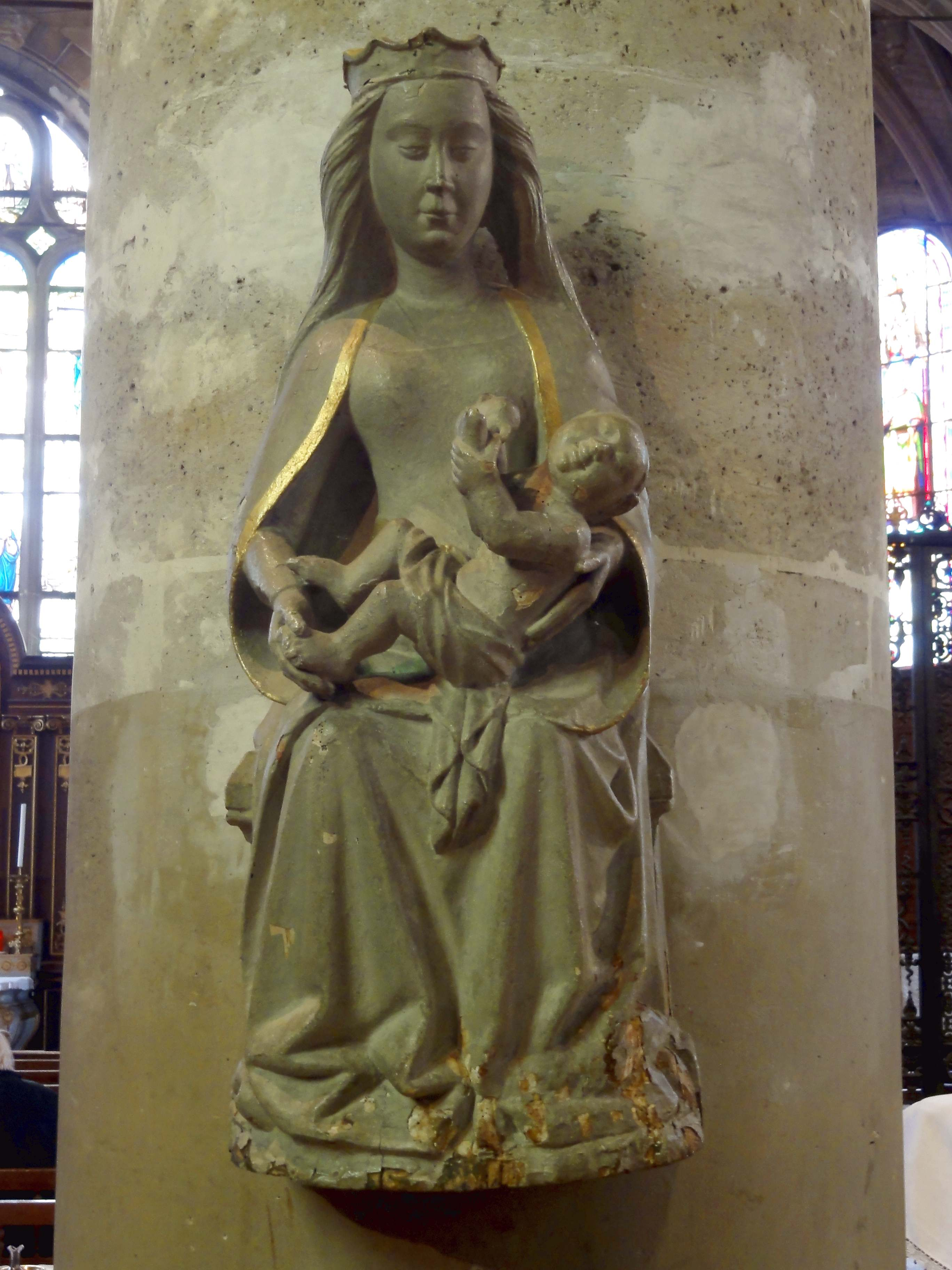 Mobilier de l'église (voir titre).